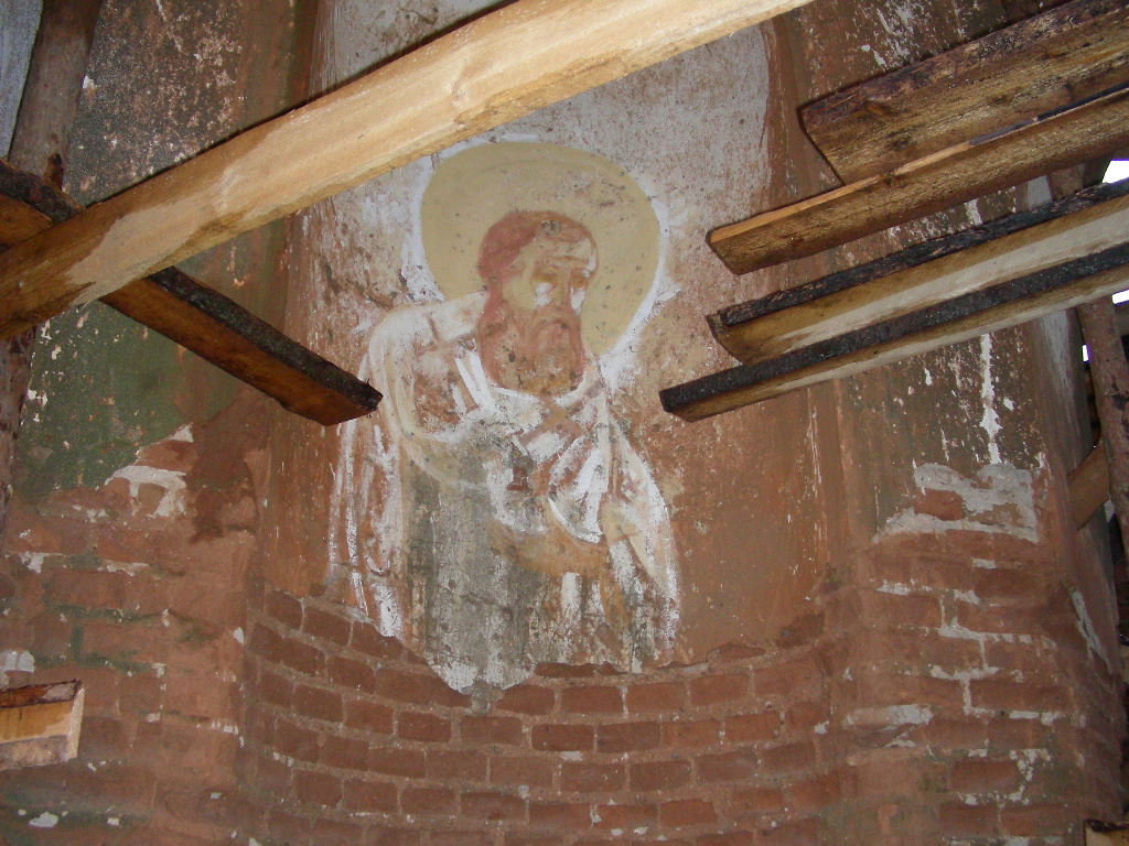 Беларуская (тарашкевіца): Ансамбль былой сядзібы: жылы дом скарбніца флігель паўночная ўязная брама гаспадарчыя пабудовы рэшткі Сьвята-Мікалаеўскай царквы валун воданапорная вежа парк альтанка. в. Станькава This is a photo of Belarusian heritage monument. Reference number: 613Г000144 ( WLM)